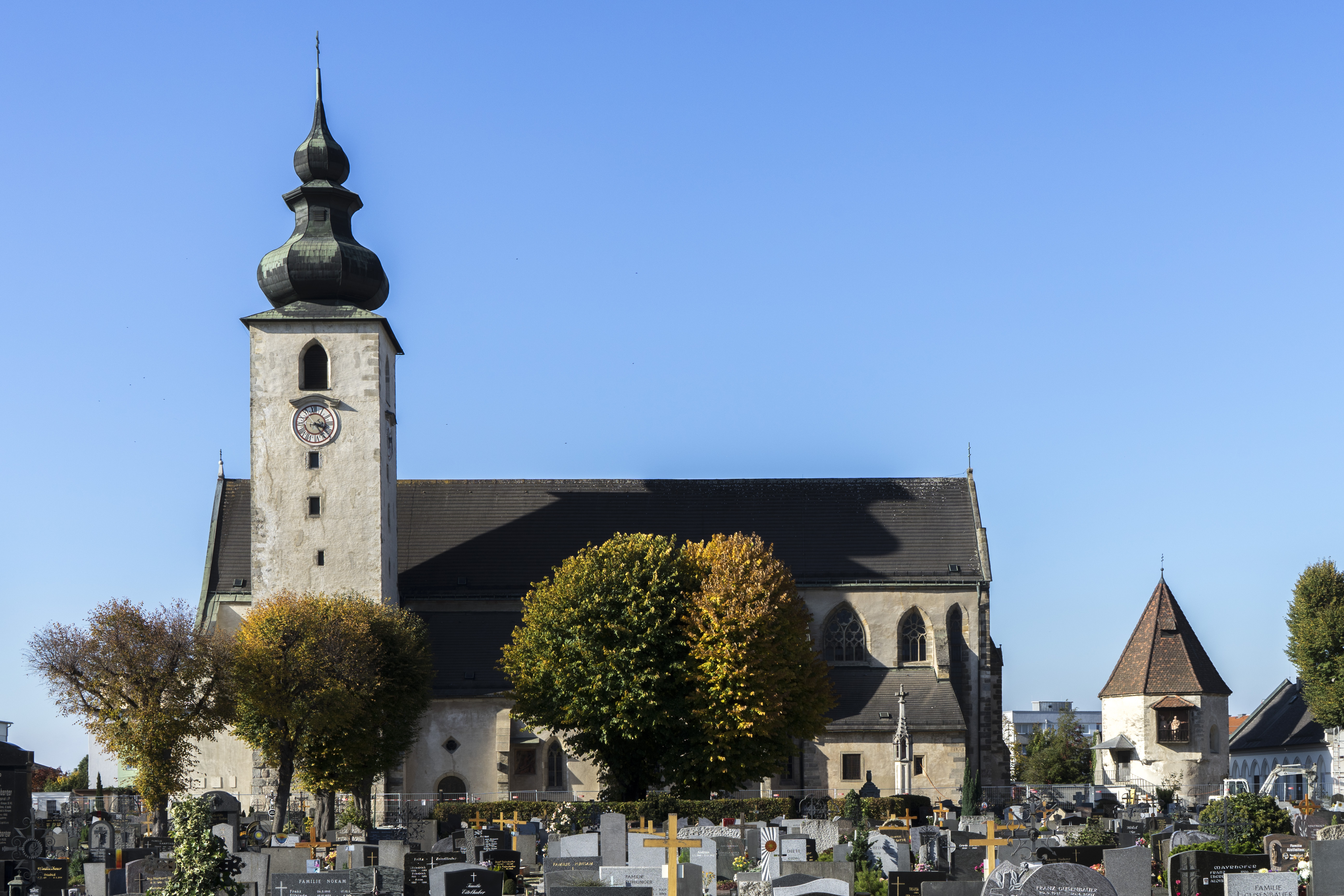 Sankt Laurenz, Lorch, Enns